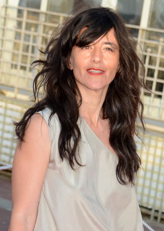 Romane Bohringer au festival du film de Cabourg